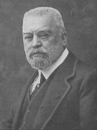 Павел Иванович Харитоненко (1852—1914) — российский промышленник и предприниматель, сахарозаводчик, покровитель искусств, создатель усадьбы Натальевка.